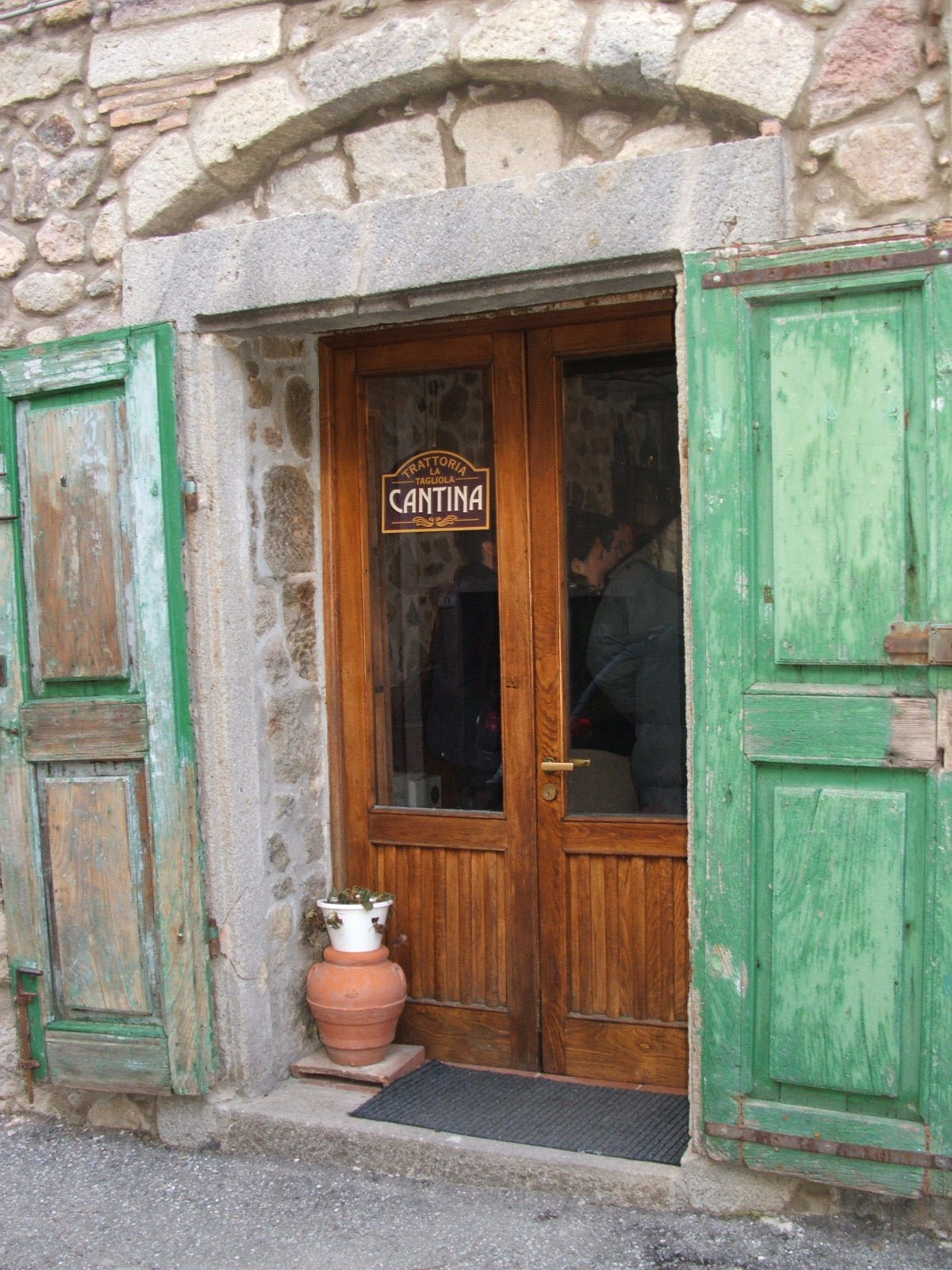 Wikiraduno a Castel del Piano. Wikicantina a Bagnoli di Arcidosso.